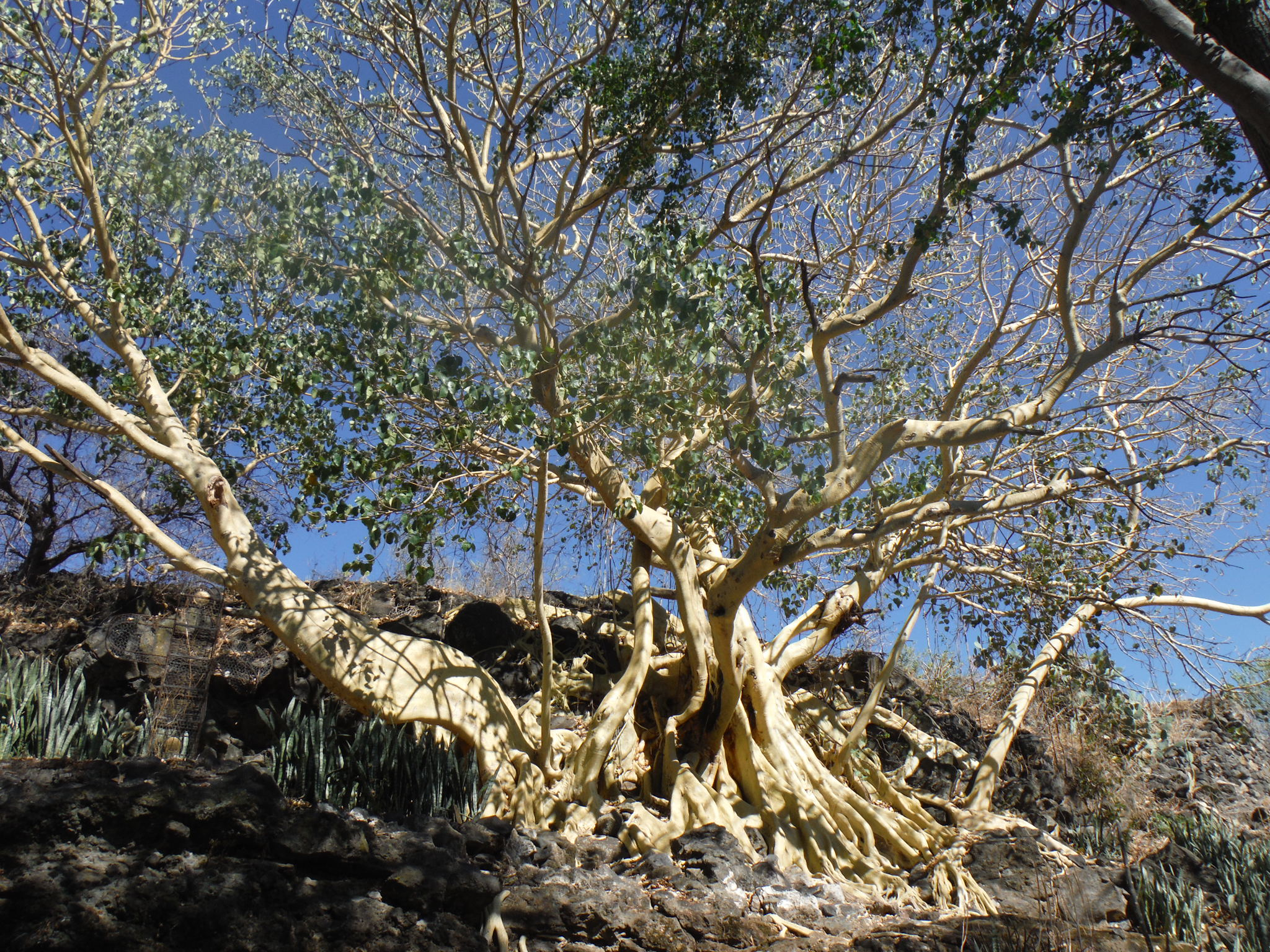 Árbol representativo de la Isla de Mezcala.